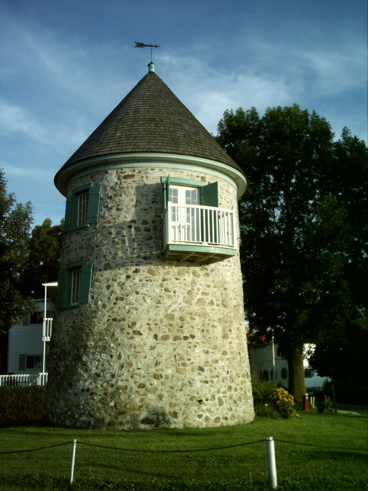 Moulin banal (moulin seigneurial) construit en 1734 à Verchères (Québec)